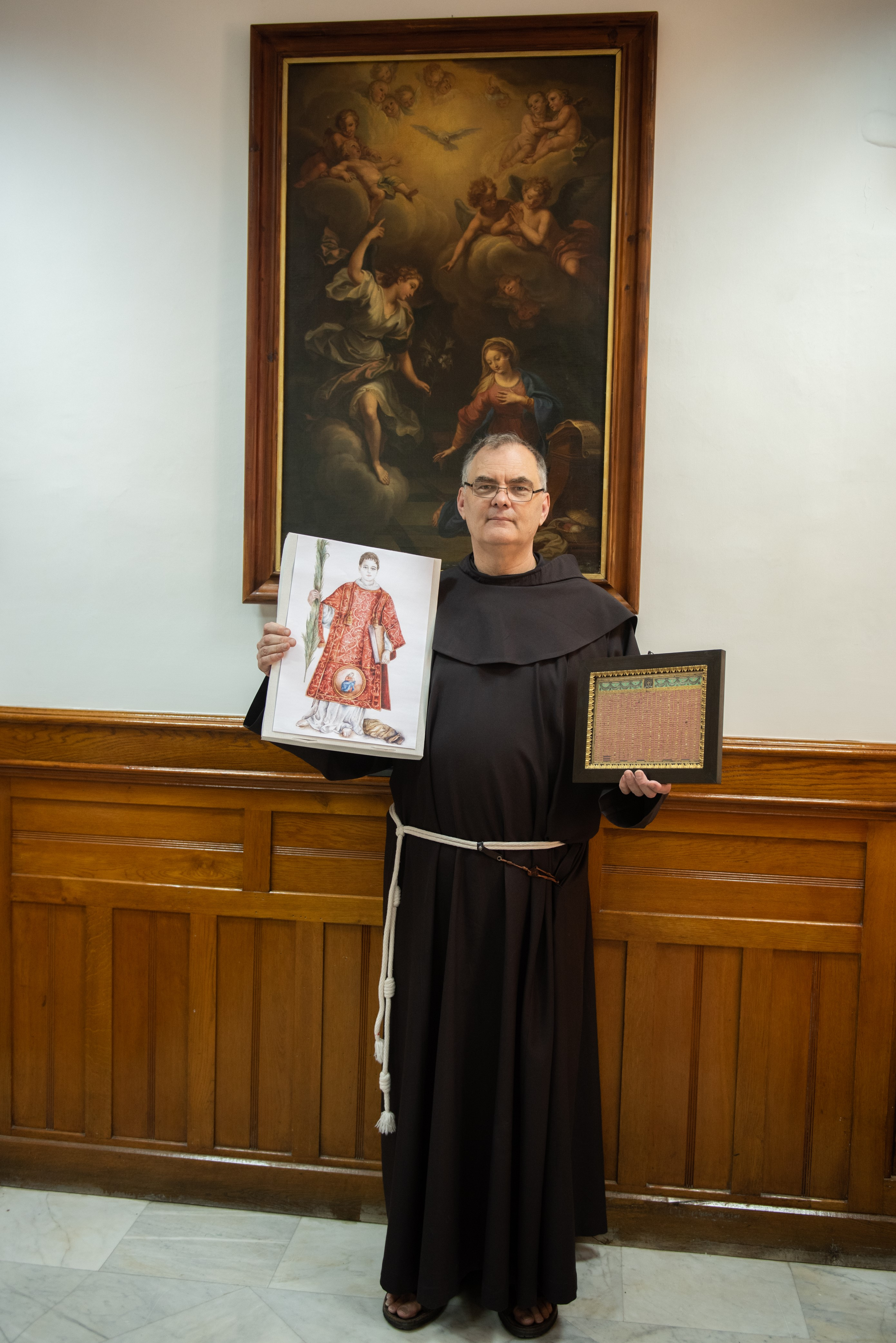 Gerusalemme (Israele), Terra Sancta Museum, Padre Stéphane Milovitch, direttore dell’ufficio dei Beni Culturali della Custodia di Terra Santa, accanto alla reliquia e all'icona di San Cesario diacono e martire.